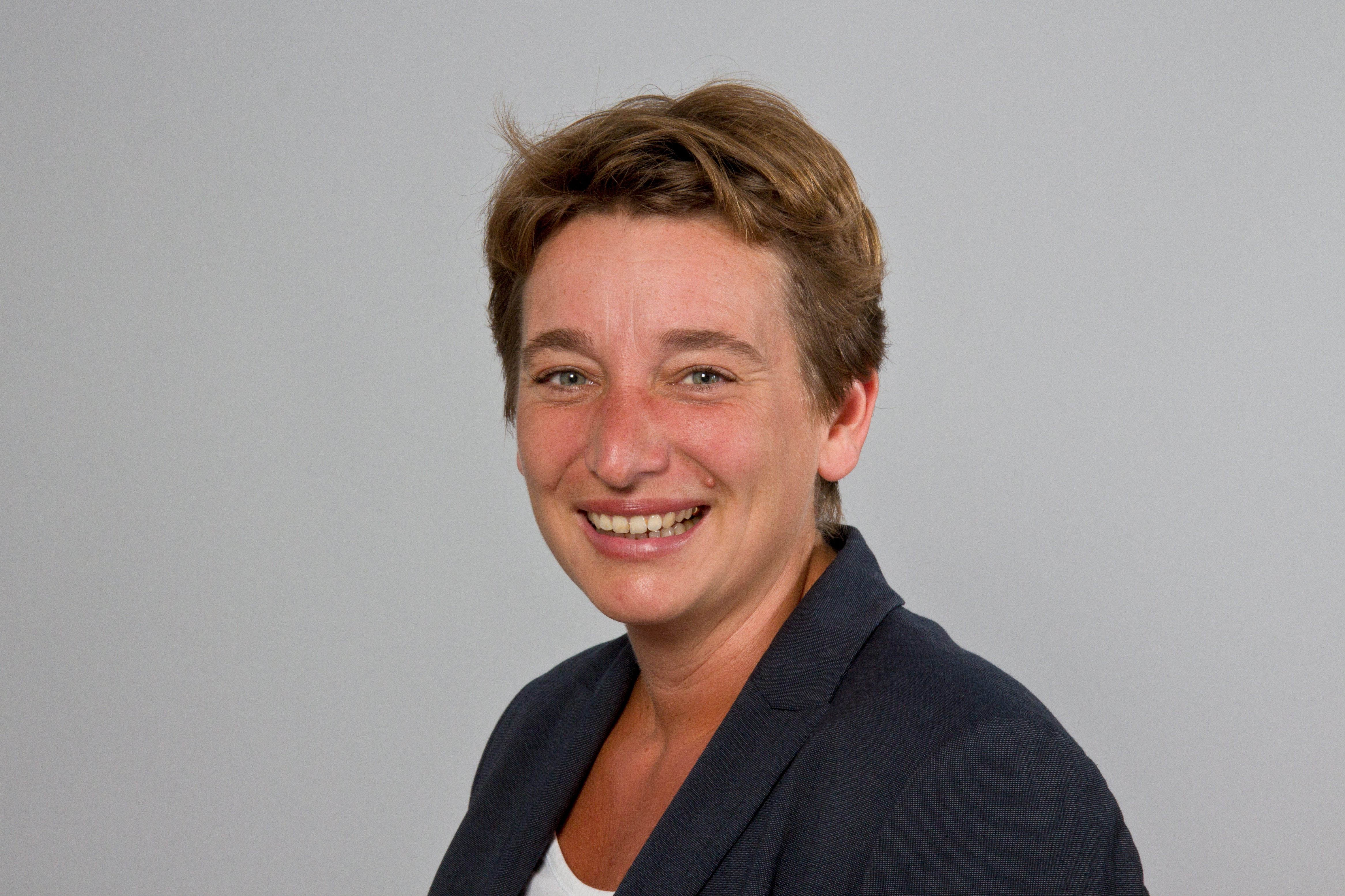 Anke Erdmann (* 30. Mai 1972 in Brake) ist eine deutsche Politikerin (Bündnis 90/Die Grünen) und Mitglied des Landtages von Schleswig-Holstein. Wikipedia im Landtag – Schleswig-Holstein 21.–23. August 2013 in Kiel Fragen zur Nachnutzung Wenn Sie Fragen zur Nachnutzung dieses Bildes haben, können Sie sich jederzeit gern an wenden Personality rights warningAlthough this work is freely licensed or in the public domain, the person(s) shown may have rights that legally restrict certain re-uses unless those depicted consent to such uses. In these cases, a model release or other evidence of consent could protect you from infringement claims.